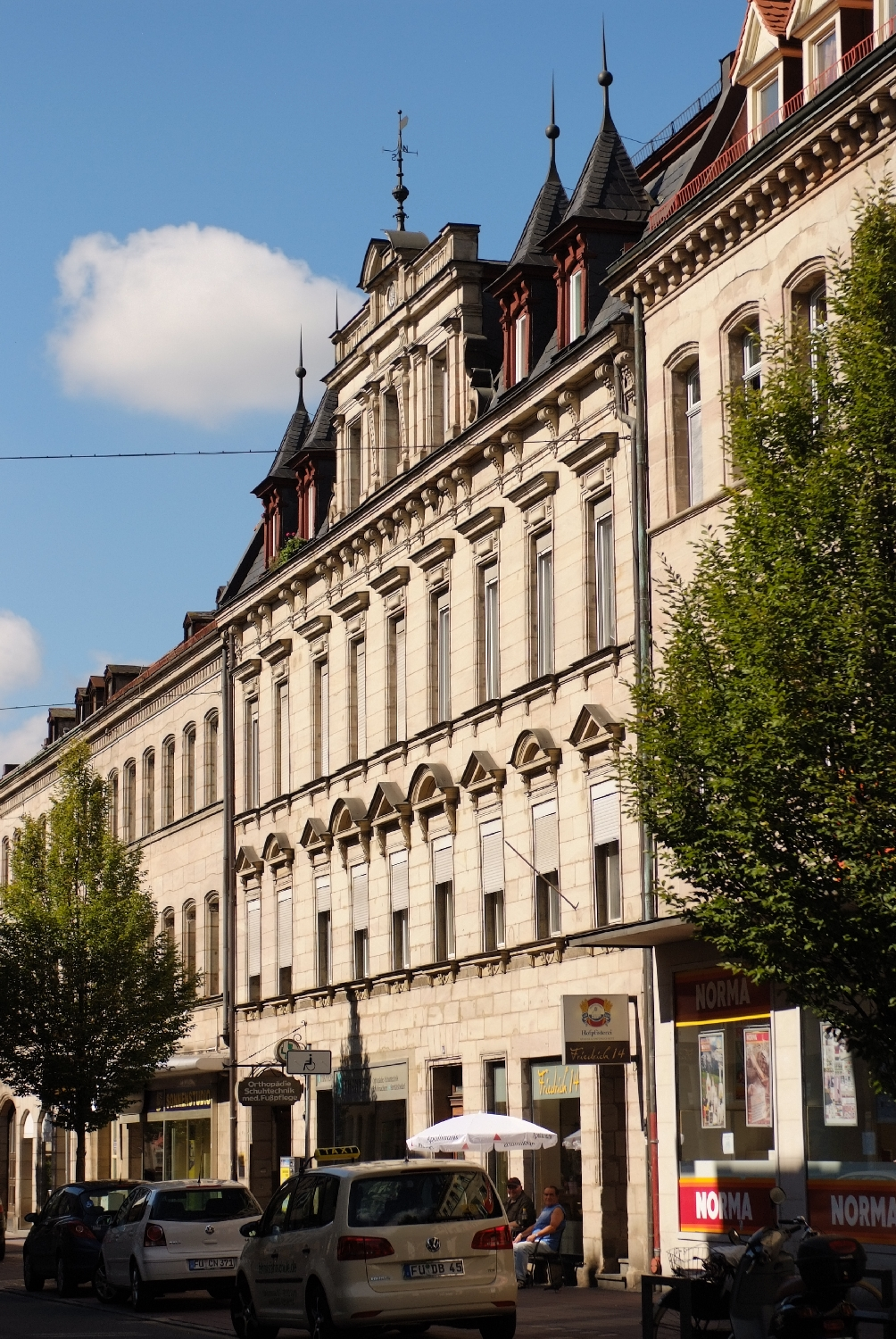 Fürth, Bavaria, Germany